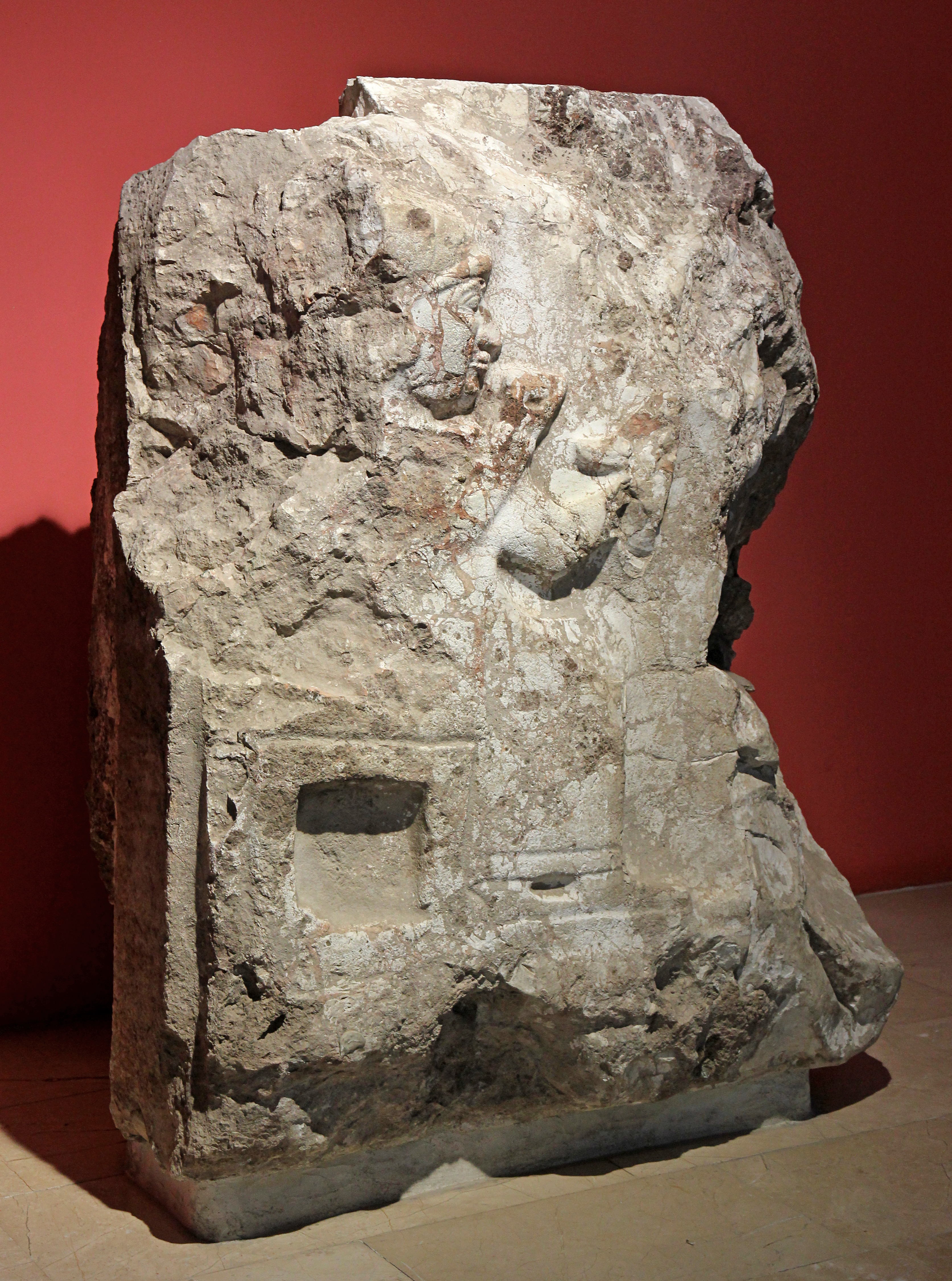 Archäologisches Museum Sivas, Zentraltürkei, Türlaibungsstein mit Relief einer sitzenden hethitischen Gottheit aus Kayalıpınar